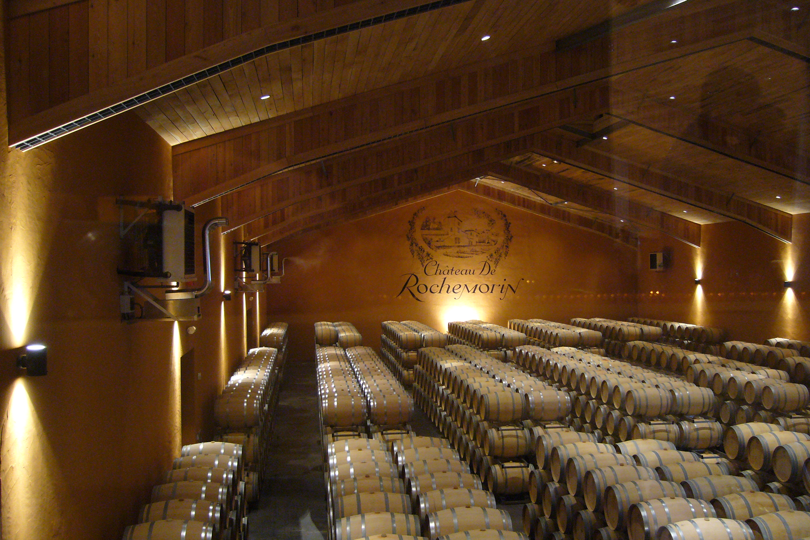 Cave vin rouge château de Rochemorin